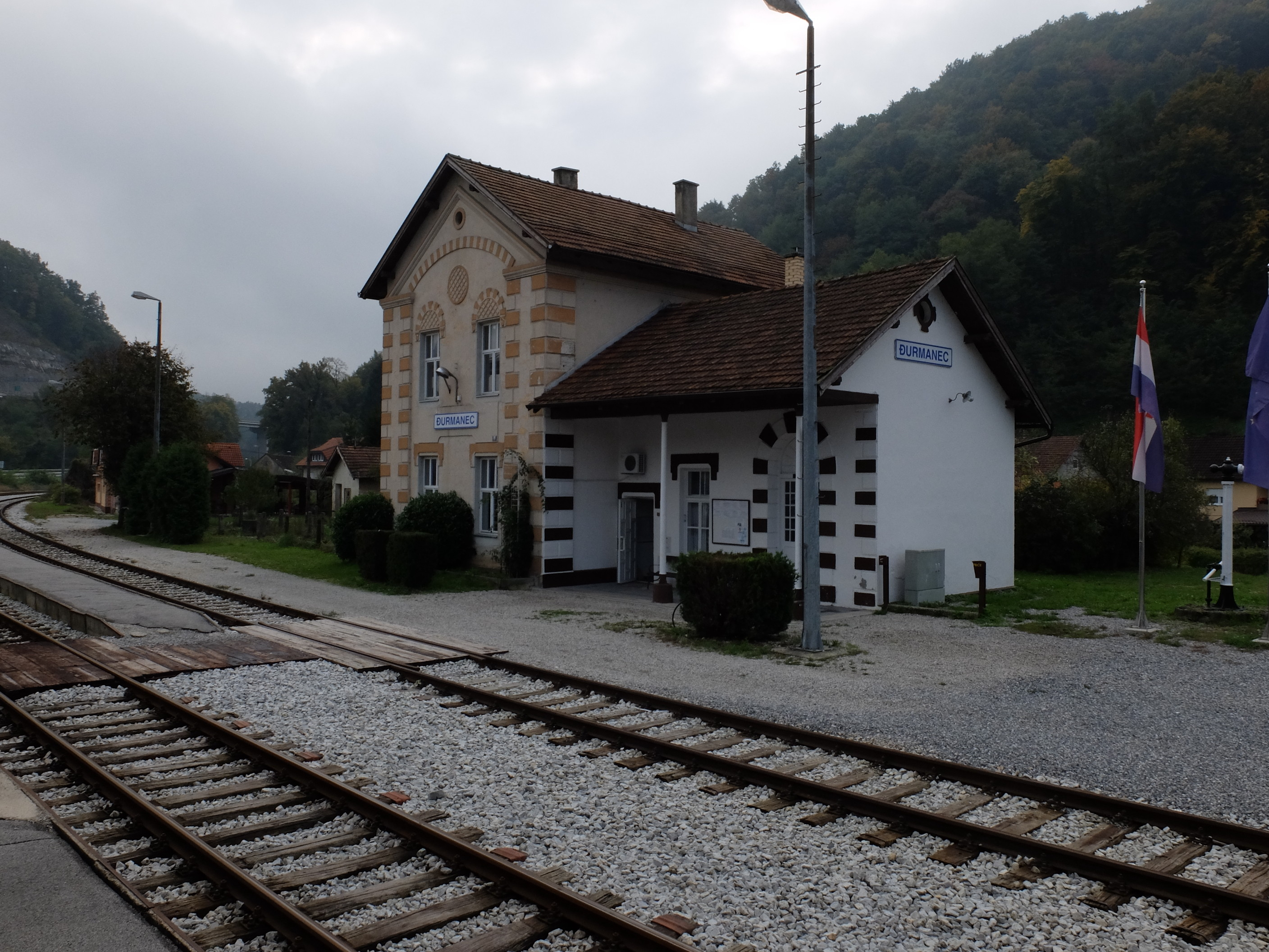 Đurmanec (Bahnhof)